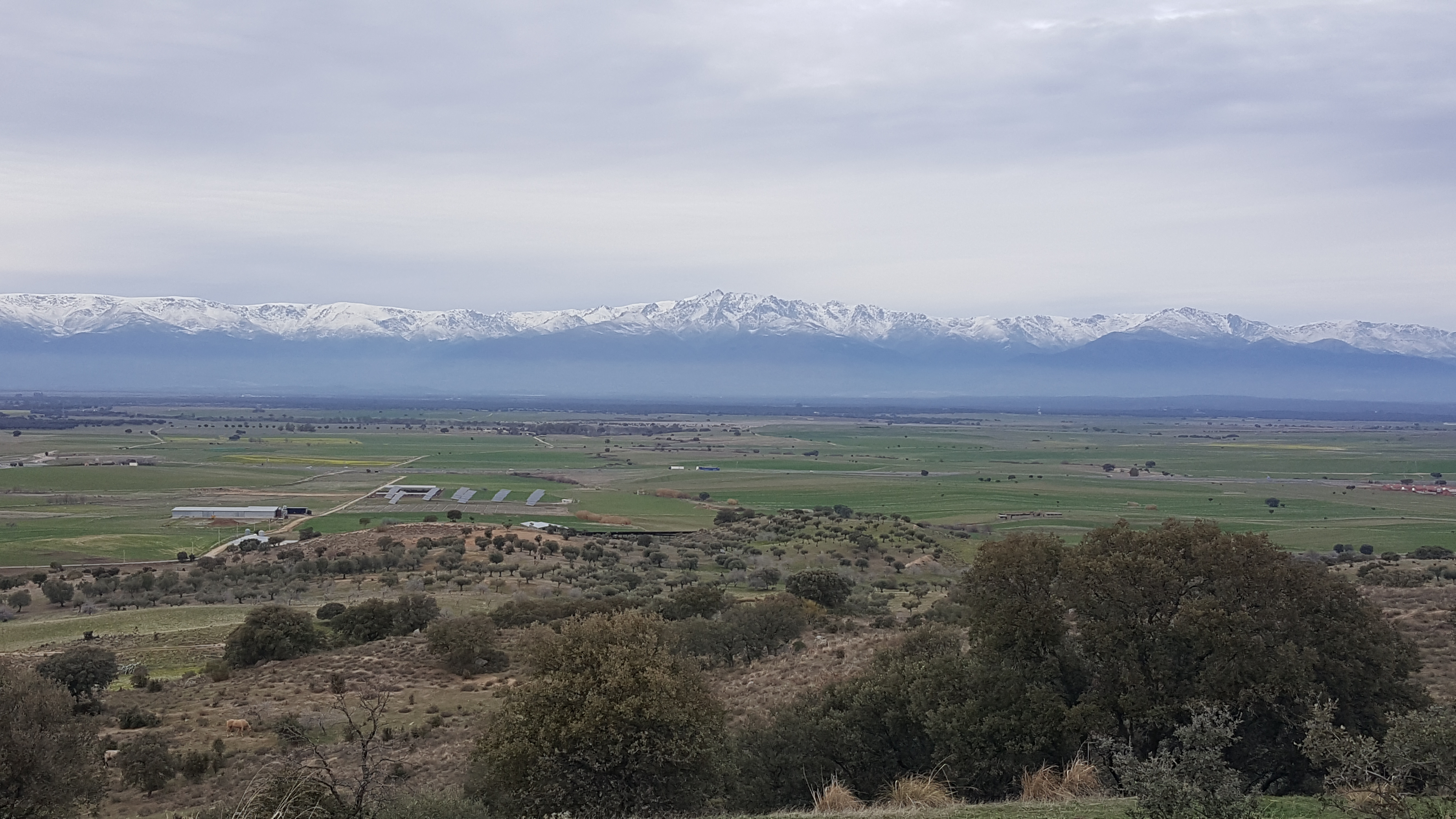 Imagen tomada desde el cerro de los Castrejones